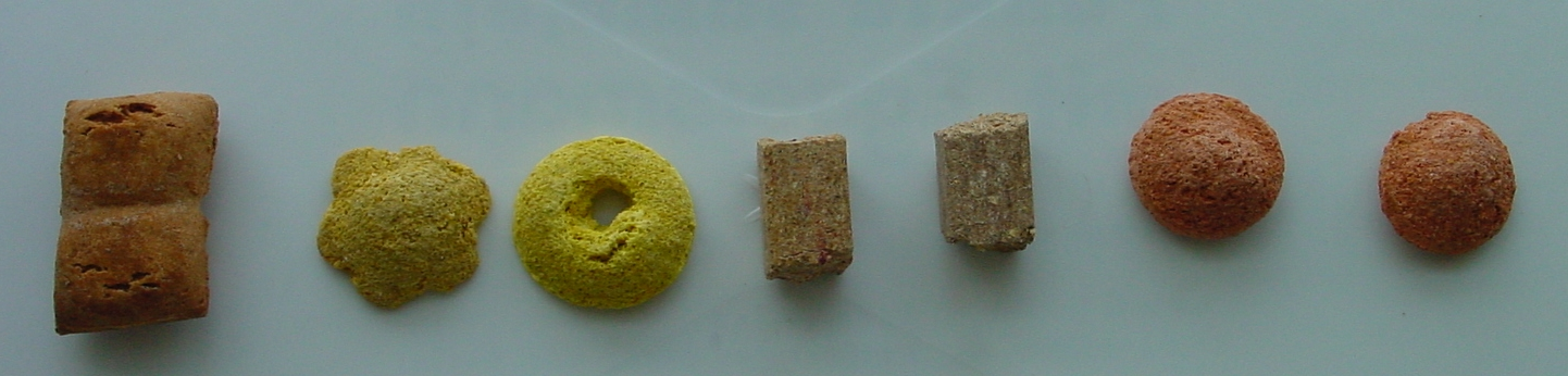 Pferdesnacks verschiedene, sogenannte ,,Leckerlies". Von links: Bosselmanngebäck, 2 Maissnacks, 2 Mineralsstücke, 2 Kräutersnacks